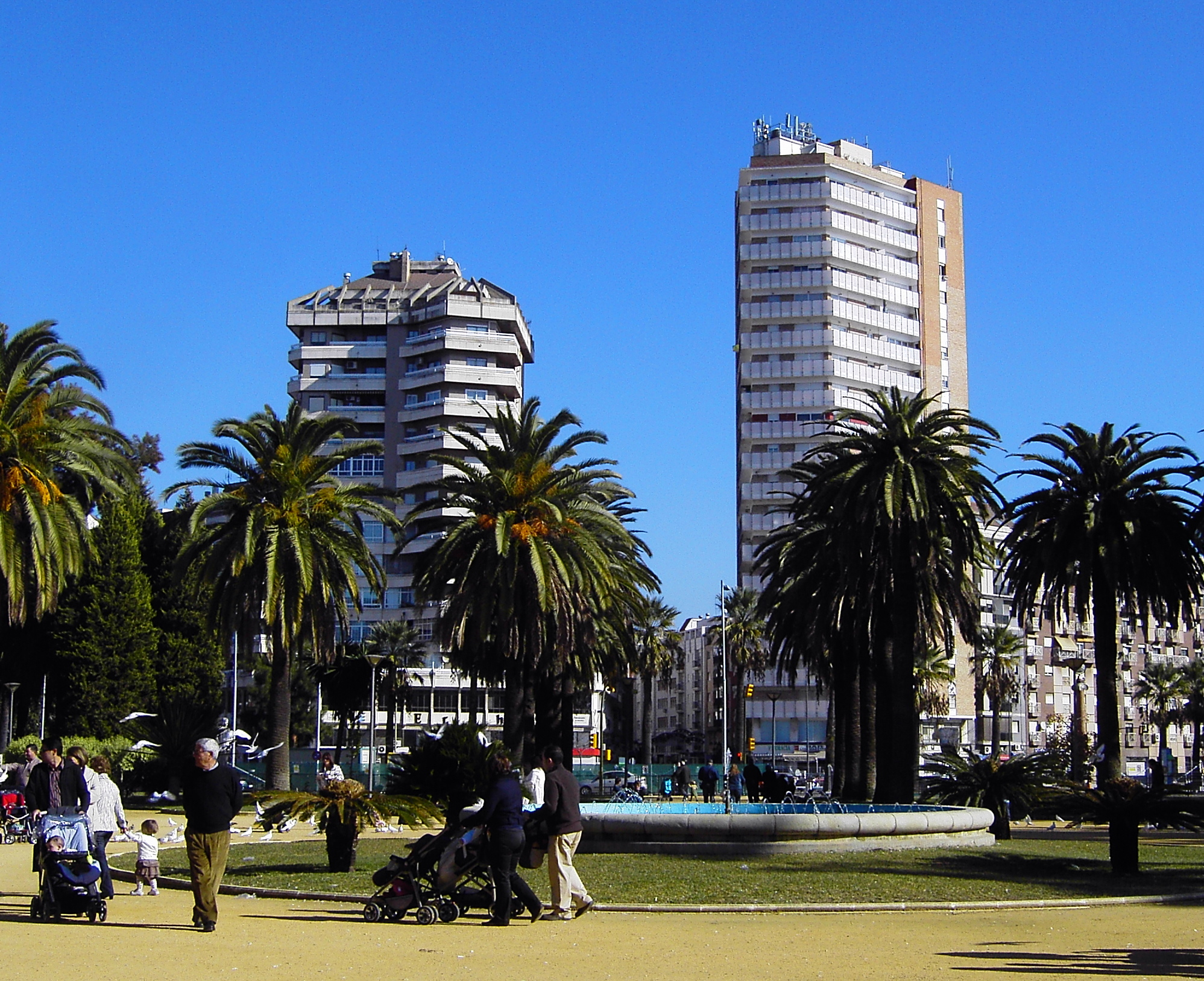 Parque de las palmeras (Huelva, España)